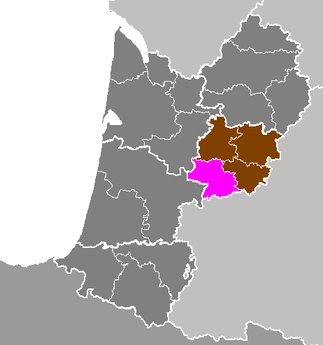 Maps of arrondissements and cantons of France: Département de Lot-et-Garonne - Arrondissement de Nérac.PNG (Région Aquitaine)